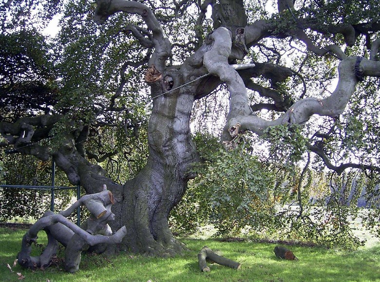 Die Süntelbuche (Fagus sylvatica 'Tortuosa') bei Gremsheim. Der abgebrochene Ast zeigt den beginnenden Zerfall des Naturdenkmals.